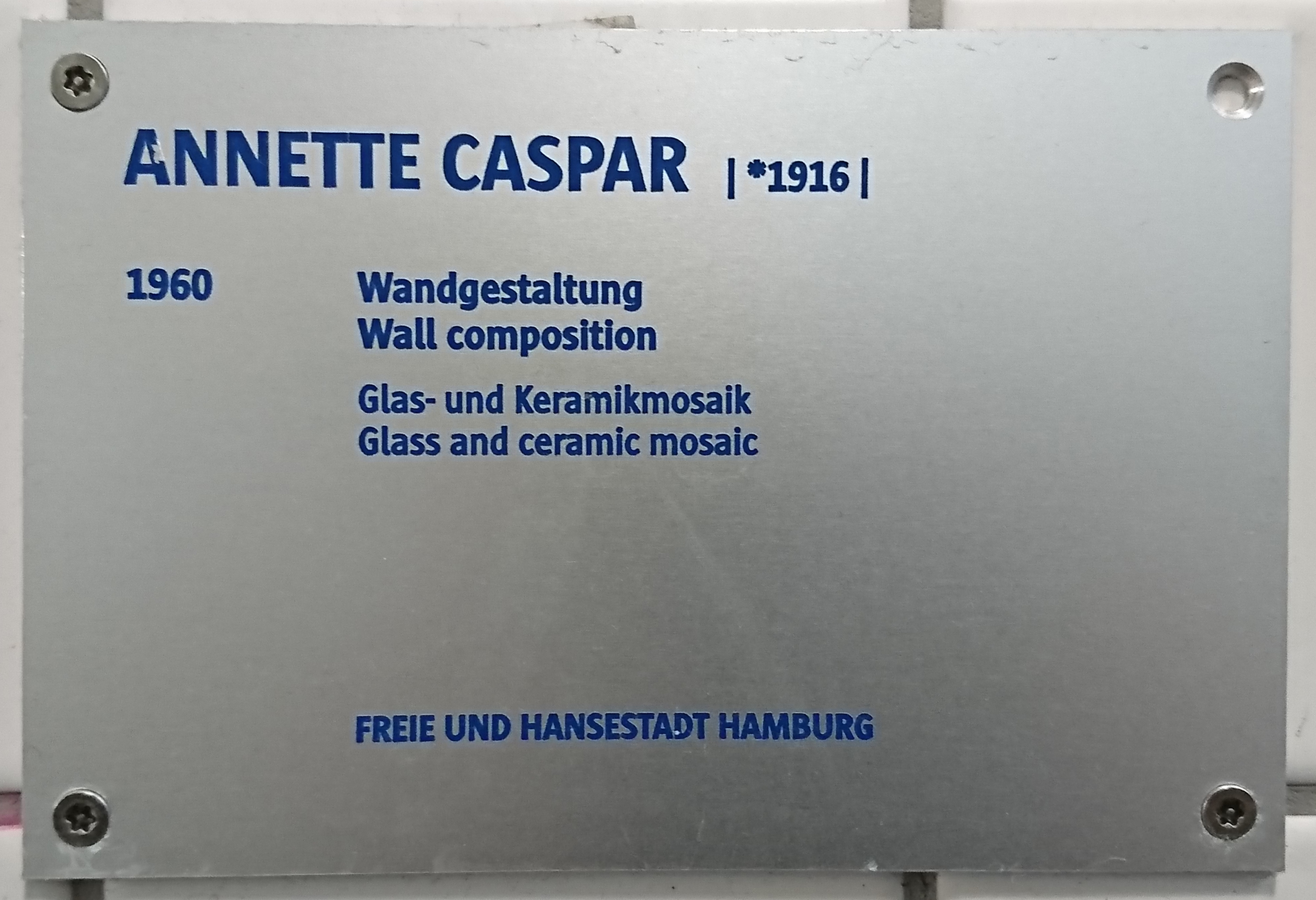 Hinweisschild an der Treppenwand im U-Bahnhof Kiwittsmoor, Hamburg-Langenhorn